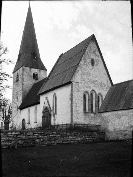 Kyrkan från sydöst.